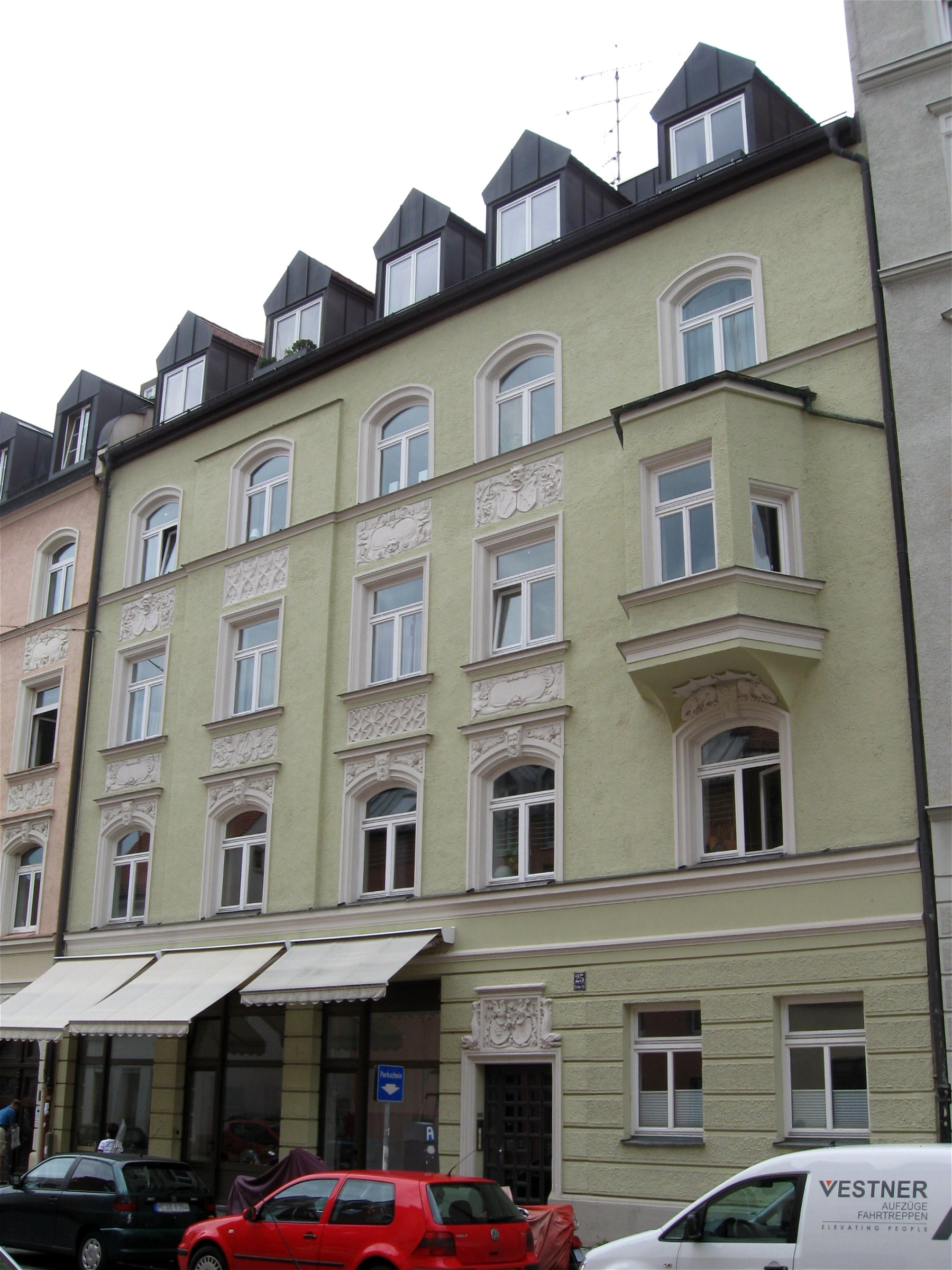 Kirchenstraße 25; Mietshaus, deutsche Renaissance, mit Erker und reichem Stuckdekor, 1898 von Ludwig Grothe; Gruppe mit Nr. 21 und 23.